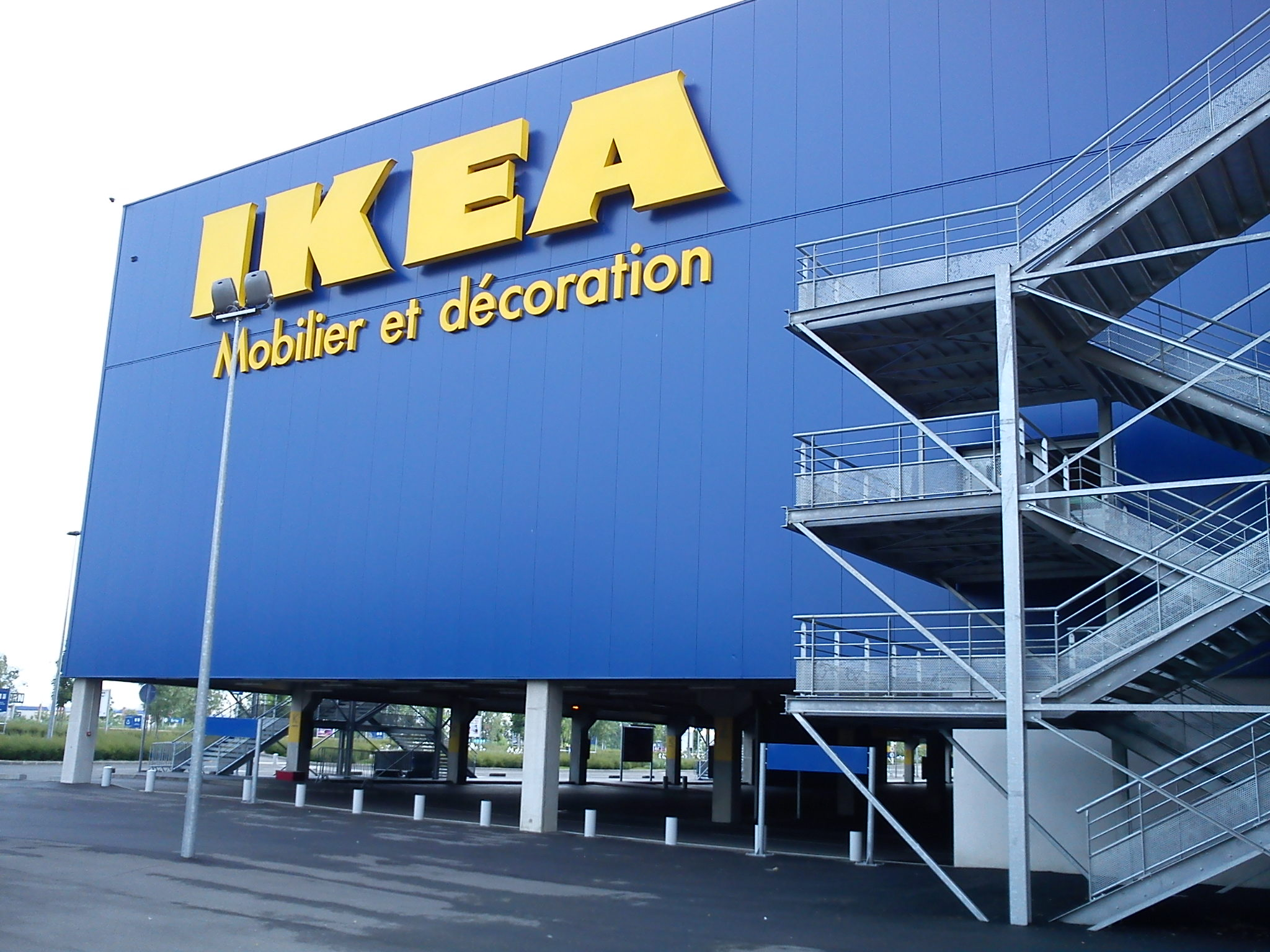 IKEA magasin Mobilier et décoration